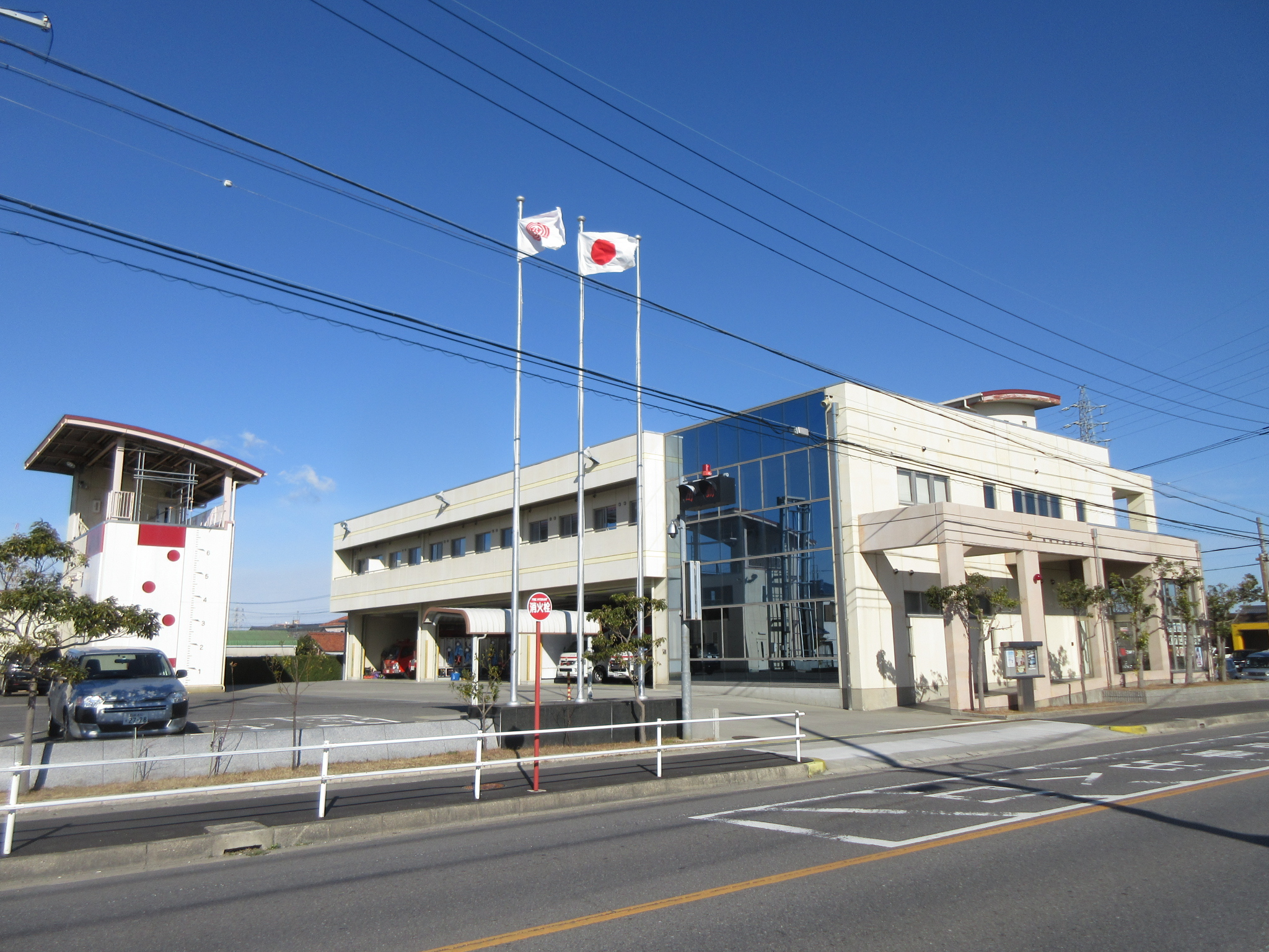 岡崎市消防本部 西消防署（岡崎市暮戸町）